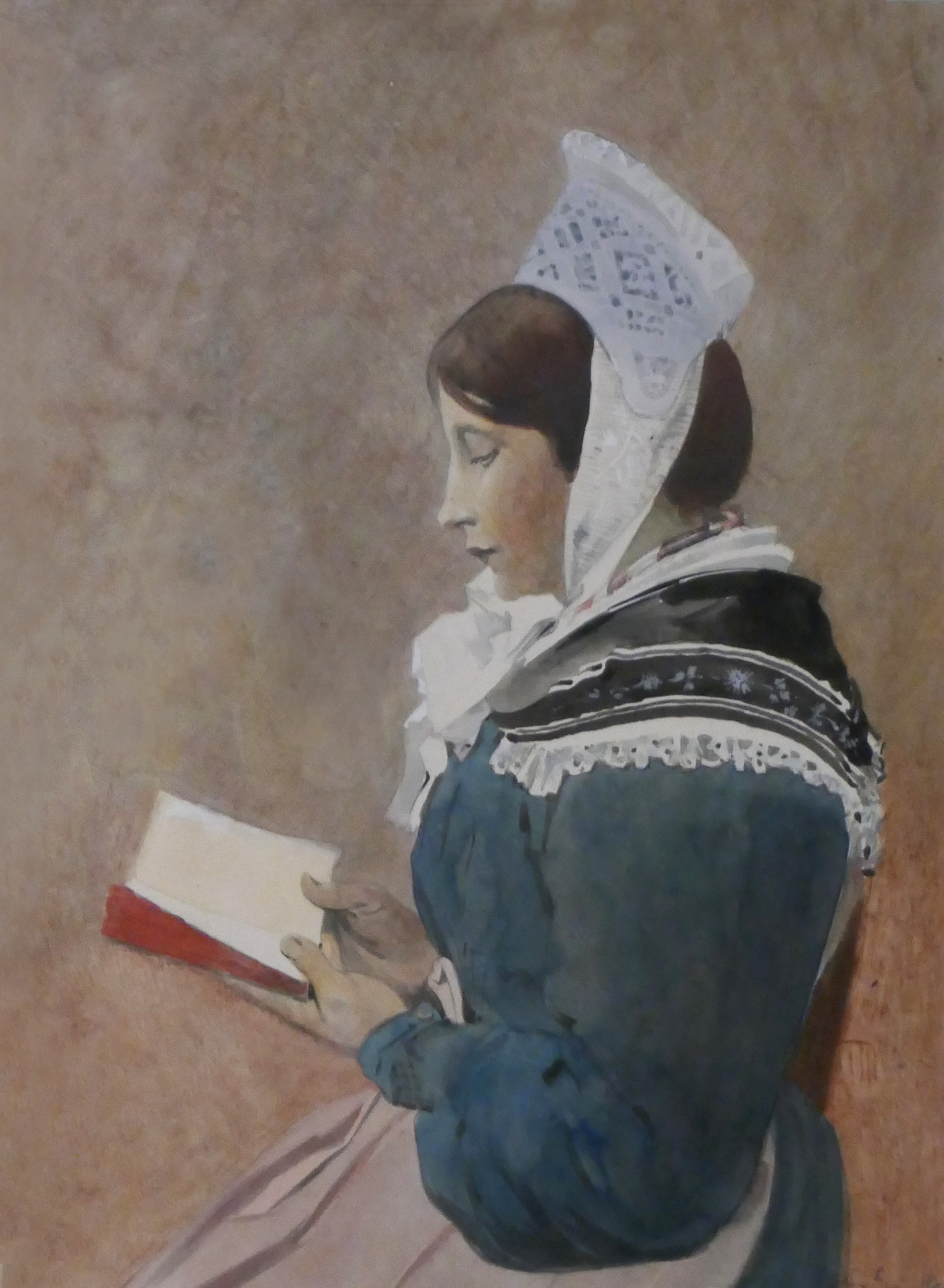 Charles Spindler, Jeune fille d'Oberrödern (Outre-Forêt). Aquarelle, vers 1890-1900. Collections du Musée alsacien de Strasbourg. Exposition temporaire Costumes d'Alsace, étoffes d'un monde au Musée alsacien de Strasbourg (2018).